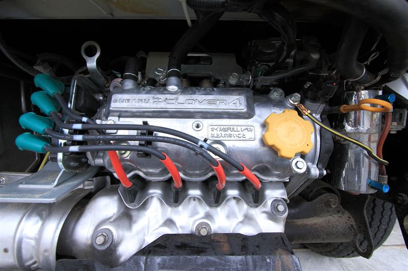 6代目サンバートラック後期型（最終）のEN07Yエンジン